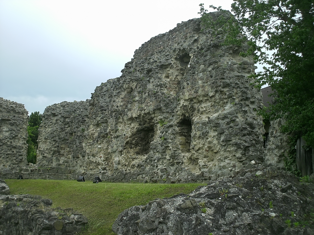 Burgus von Zeiselmauer, Südmauer